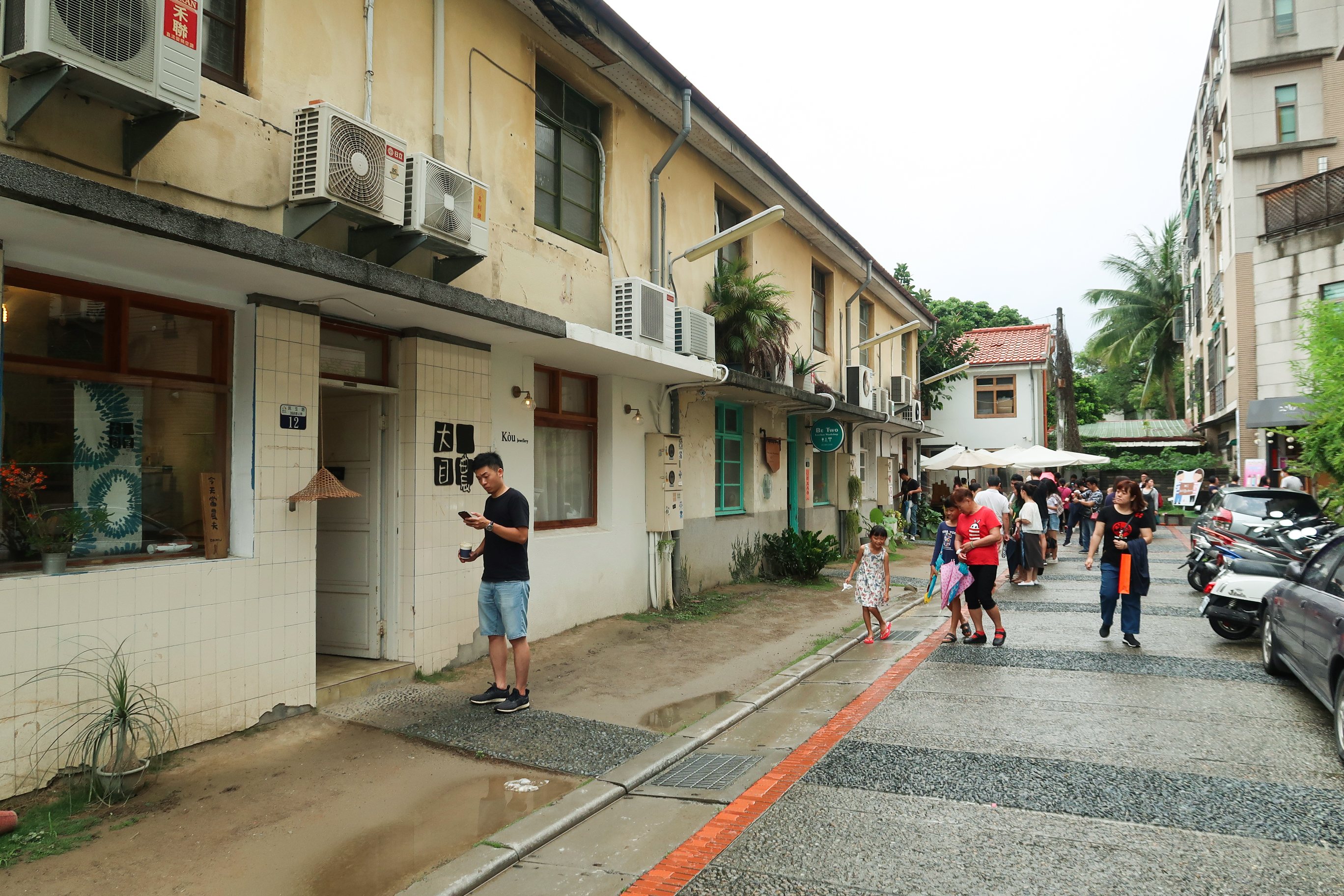 Shenji New Village